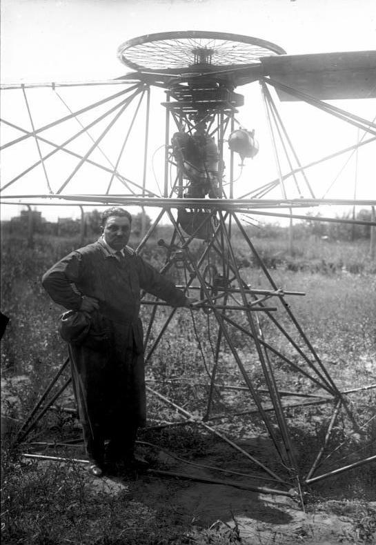 Das Flugzeug der Zukunft! Der deutsche Ober Ingenieur Zaschka hat jetzt die Versuche mit seinem Rotationsflugzeug erfolgreich beendet. Die Erfindung ermöglicht es, dass das Rotationsflugzeug infolge seiner rotierenden Tragflächen von der Erde senkrecht aufsteigen und genau so landen kann. Die rotierenden Tragflächen sind in der Mitte mit einem Kreisel verbunden, welche 1400 Umdrehungen in der Minute macht und durch einen luftgekühlten Motor angetrieben wird. Der Kreisel hält gleichzeitig die Ballance des Flugzeuges und regelt die Geschwindigkeiten. - Der deutsche Ober-Ing. Zaschka an dem von ihm construierten Rotations-Flugzeug während der Versuche. Oben der Kreisel sowie der Motor des Versuchsflugzeuges.